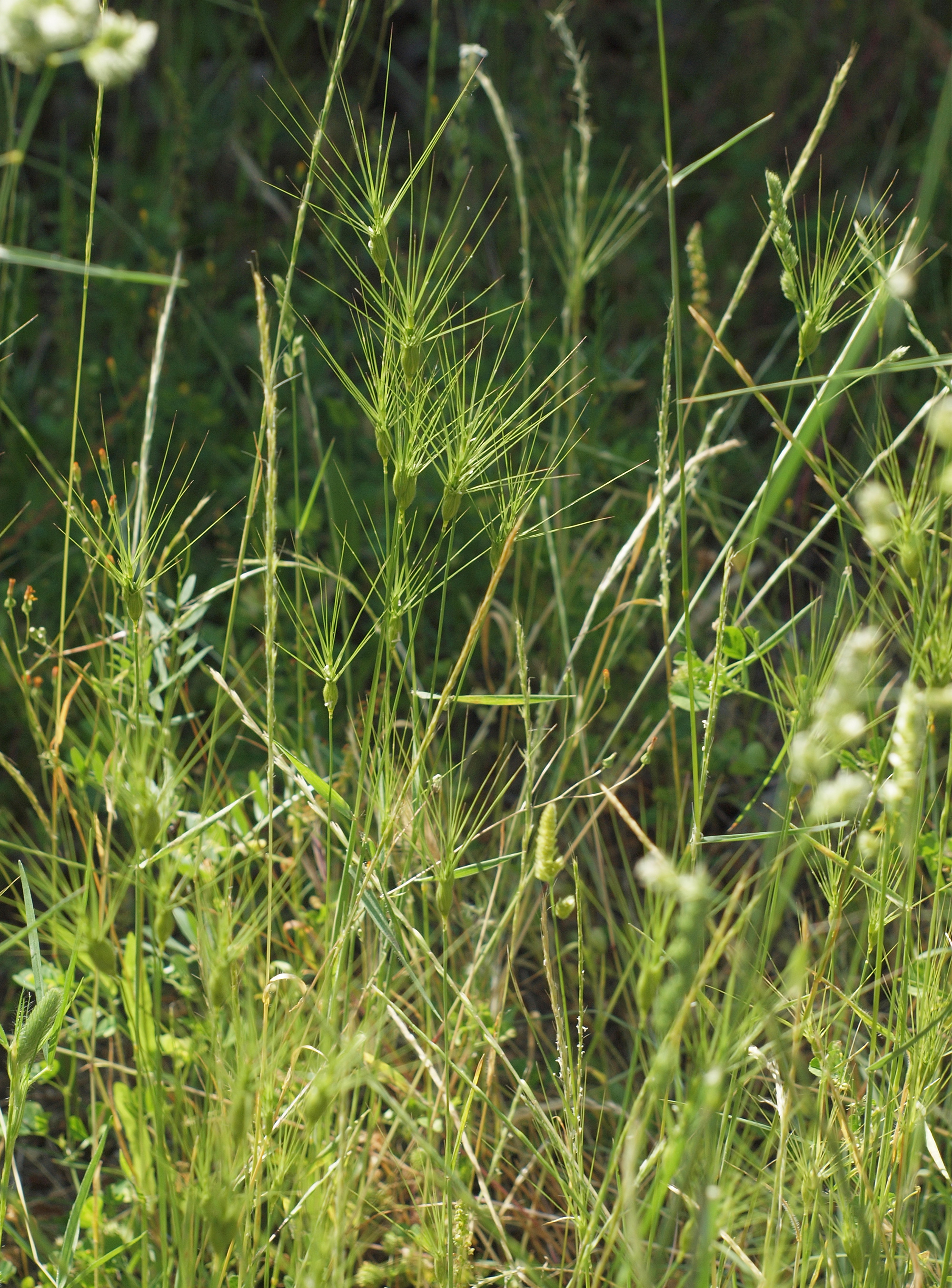 Aegilops neglecta. Losar de la Vera (Cáceres, España).